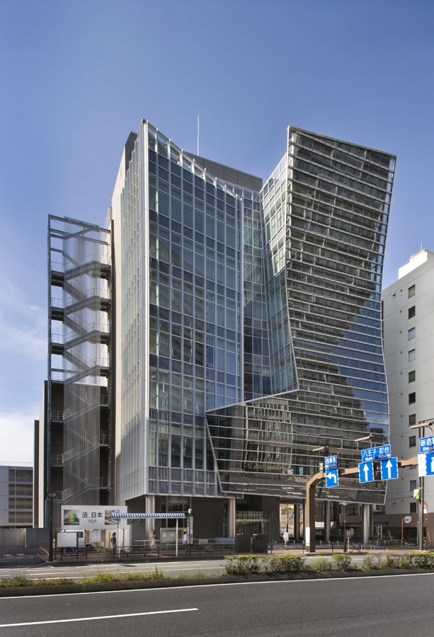 駐日韓国文化院ビュー